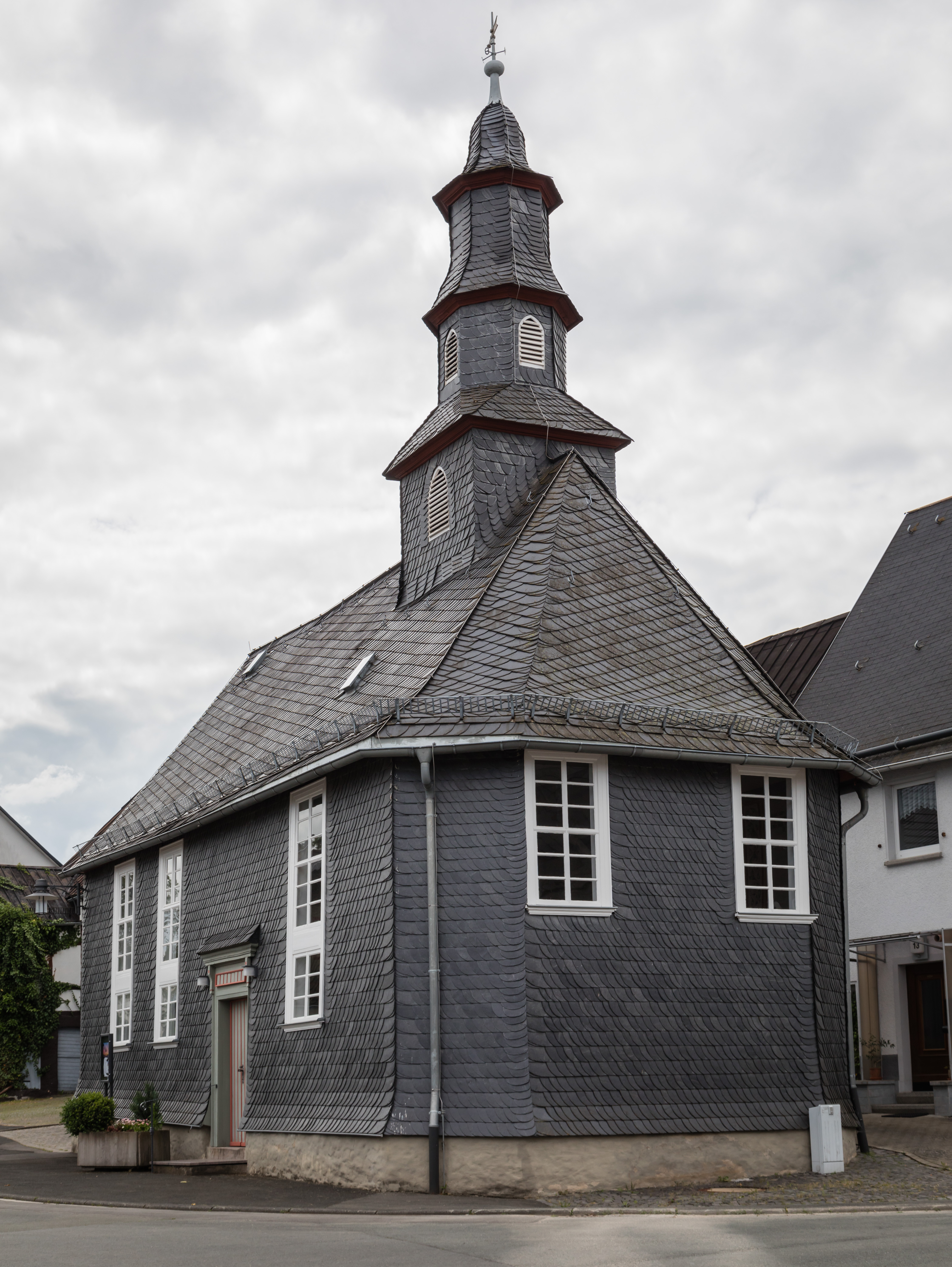 Roth-Kirche, Kulturdenkmal